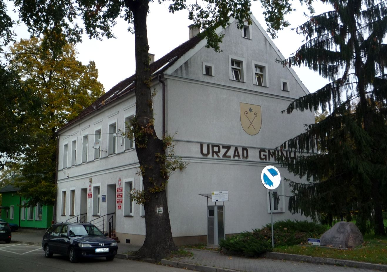 Urząd Gminy w Górzycy.